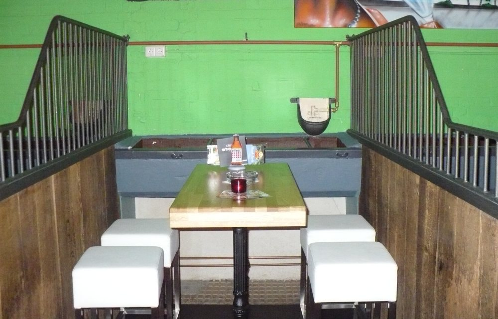 Pferdebox in der Bar im ehemaligen Pferdestall in Esslingen, Martinstraße 27/1